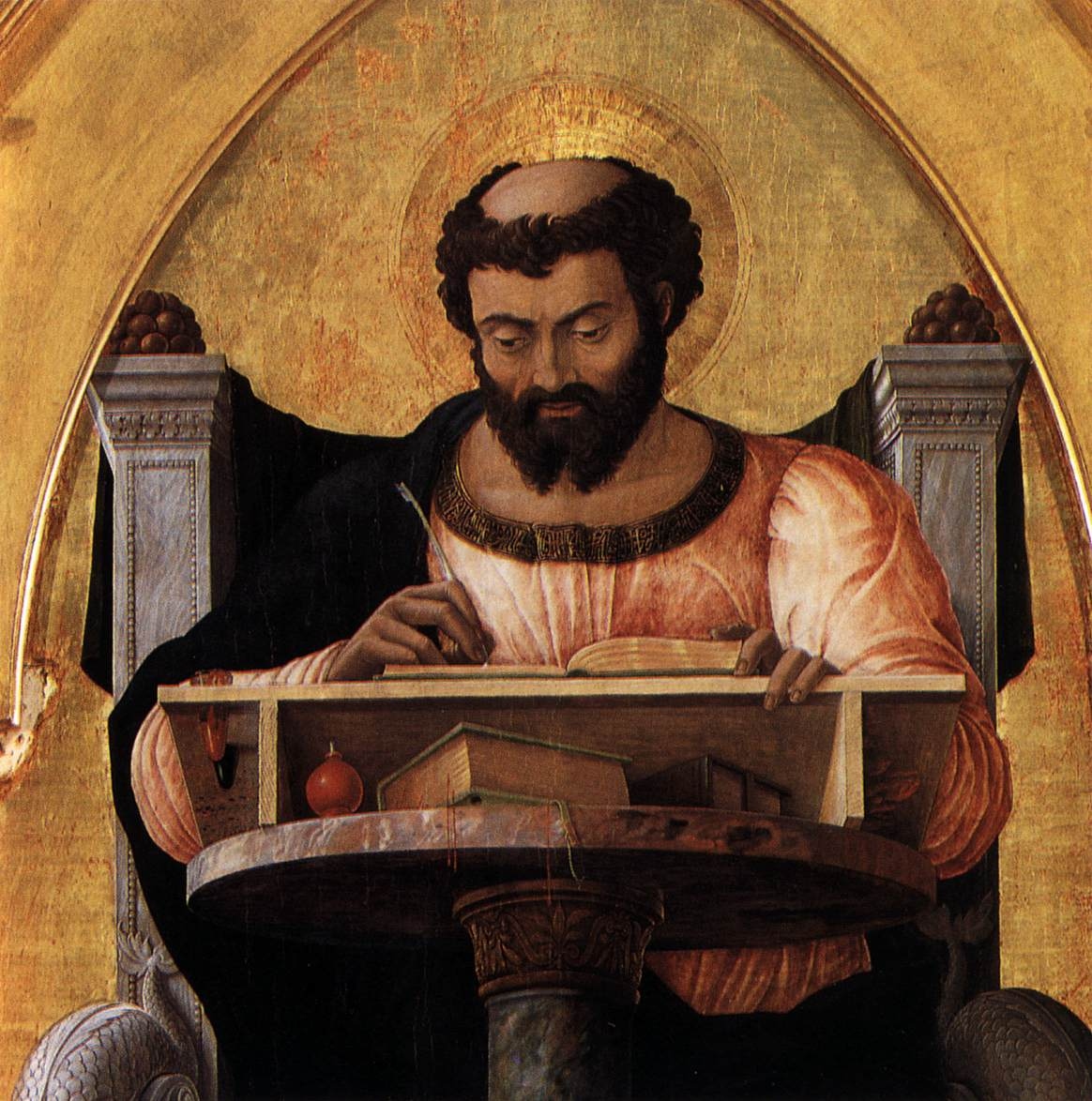 detail